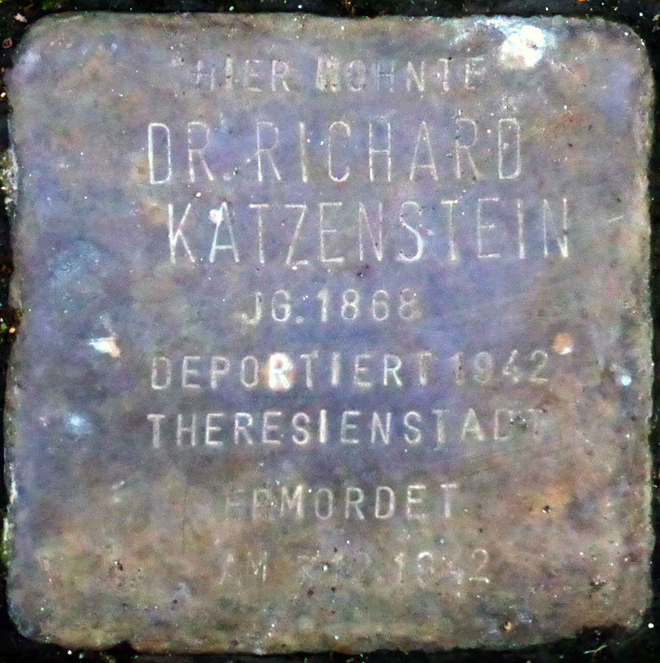 Stolperstein Richard Katzenstein, Raschdorffstraße 12, Köln Text: HIER WOHNTERICHARD KATZENSTEINJG.1868DEPORTIERT 1942THERESIENSTADTERMORDET AM 7.12.1942